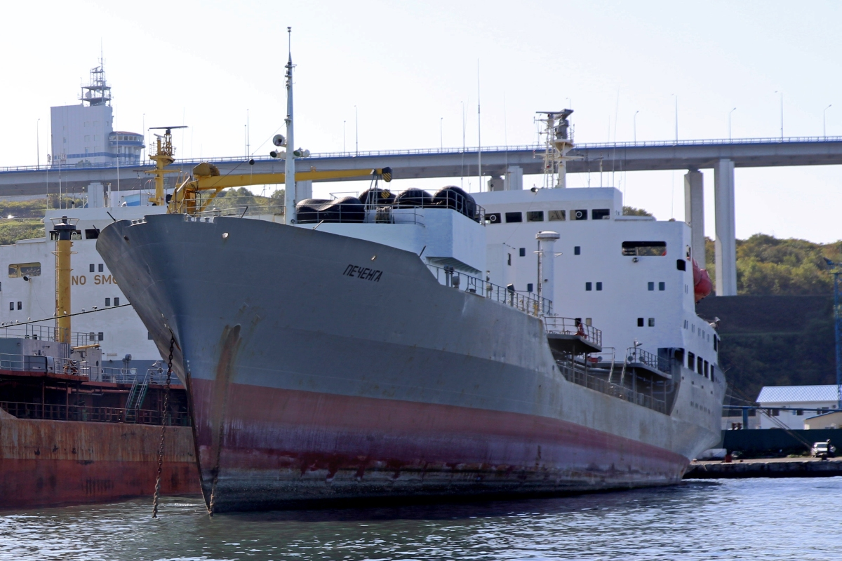 Печенга в бухте Улисс